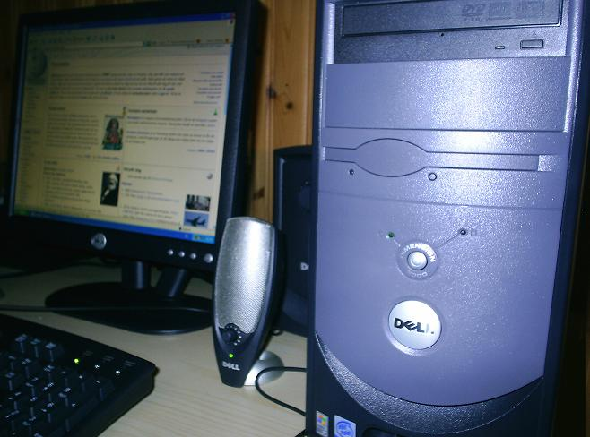 En Dell Dimension 3000. Foto av CNB.